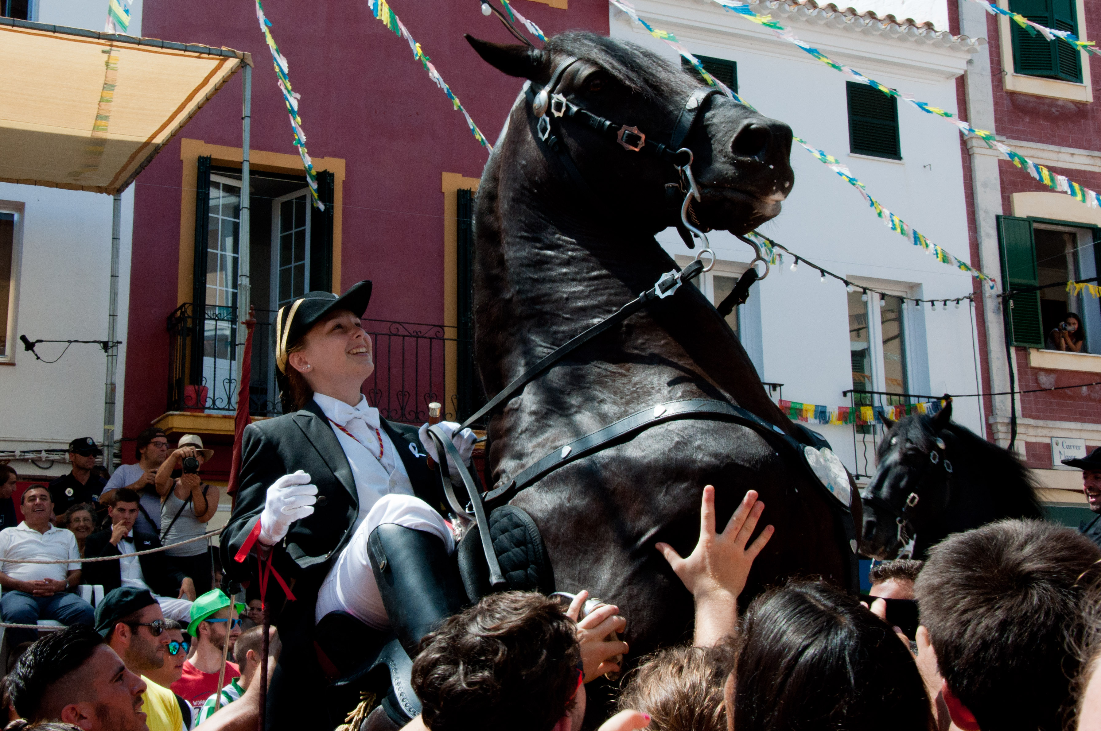 Jaleo en Mercadal This is a photography of a Folklore festival in Spain (Wikidata id Q23662637).